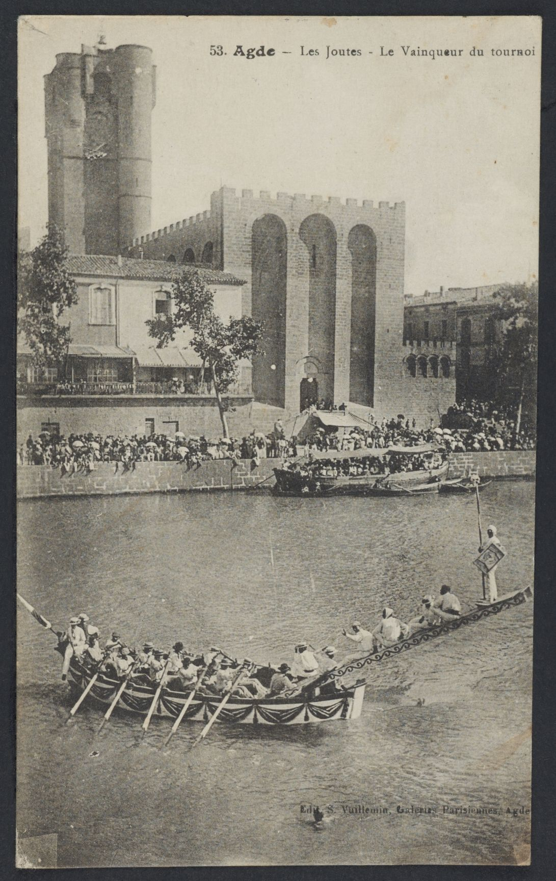 Agde joutes - Archives départementales de l’Hérault - FRAD034-2FICP-01137-00001